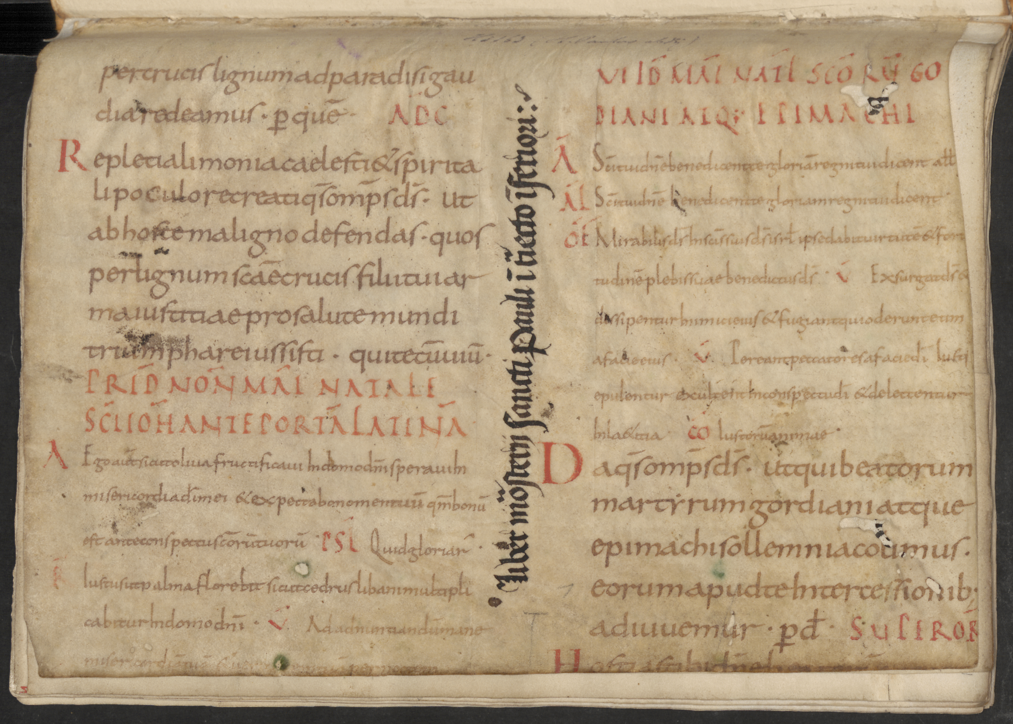 Hs.163.1e schutblad